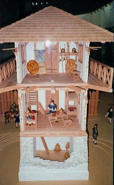 Innenansicht eines Wachturms am Obergermanisch-Rätischen Limes (2. Jahrhundert n.Chr.), Modell im Limesmuseum Aalen.